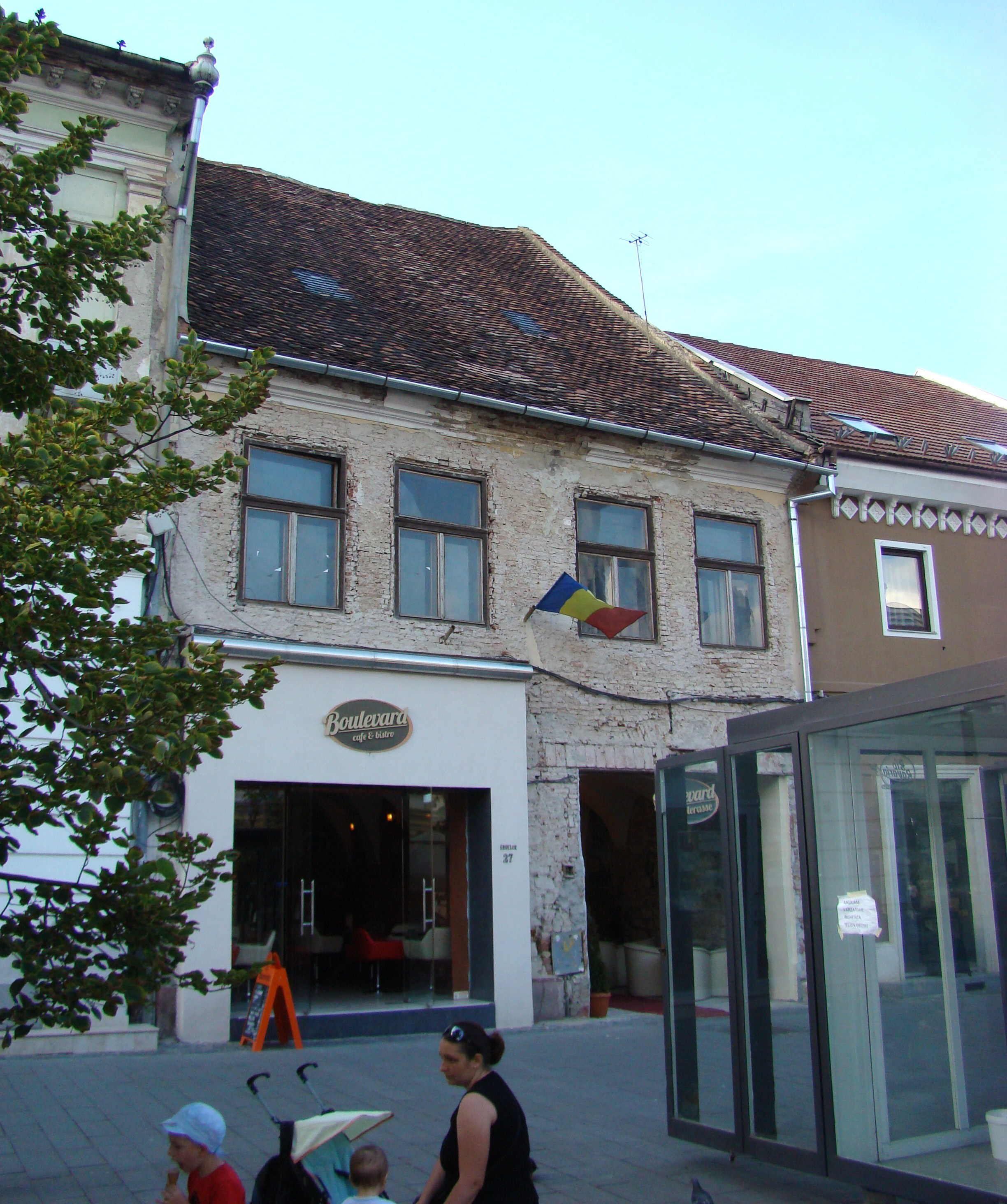 Clădire monument istoric, Bd.Eroilor, nr. 27